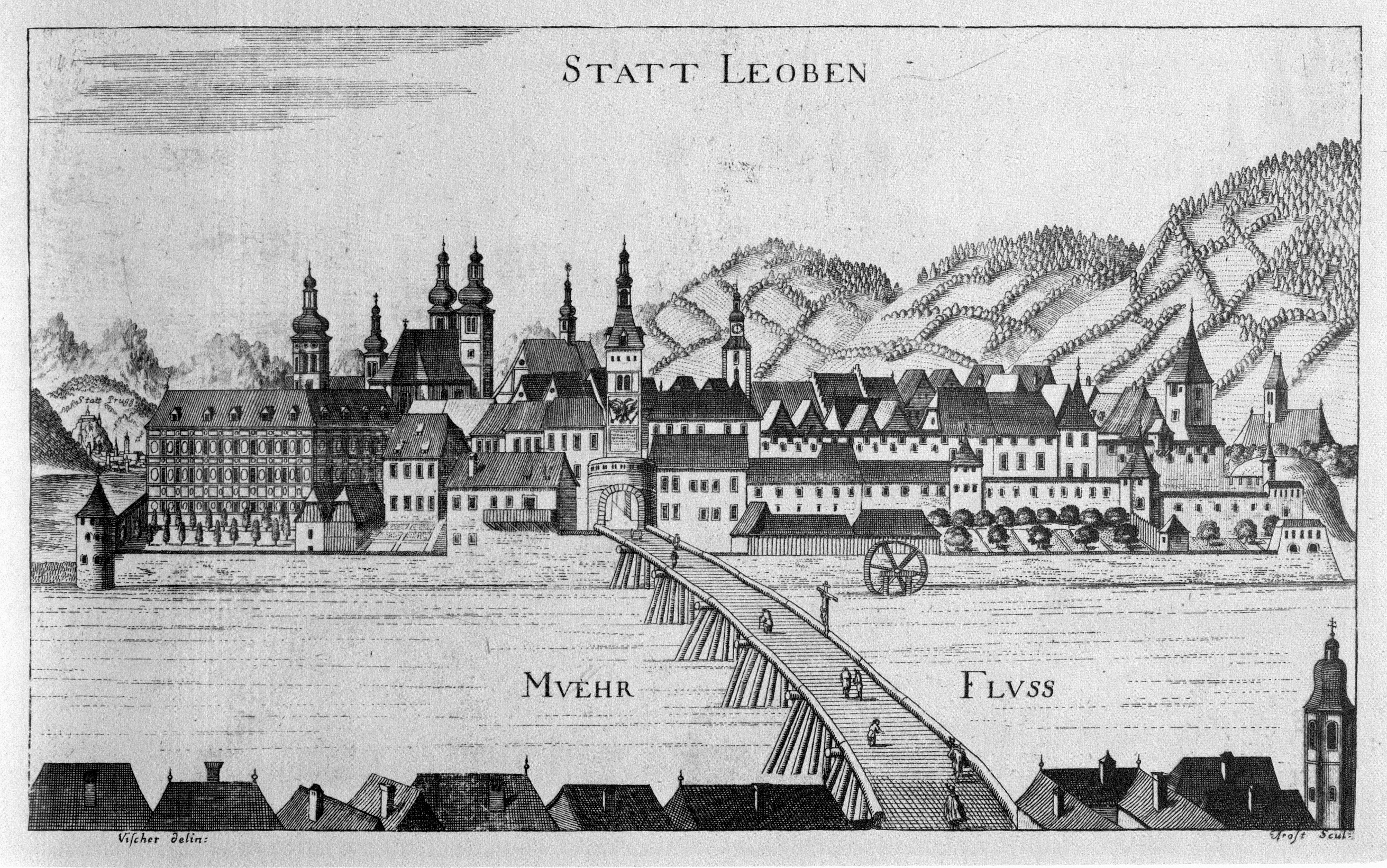 G. M. Vischers Käyserlichen Geographi, Topographia Ducatus Stiriae, Das ist: Eigentliche Delineation / und Abbildung aller Städte / Schlösser / Marcktfleck / Lustgärten / Probsteyen / Stiffter / Clöster und Kirchen / so es sich im Herzogthumb Steyrmarck befinden; Und anjetzo Umb einen billichen Preyß zu finden seynd Bey Johann Bitsch Universitäts Buchhandlern / Auff dem Juden=Platz bey der guldenen Saulen. Graz 1681 Die Nummerierung der Dateien folgt der alphabetischen Reihung der Ortsnamen